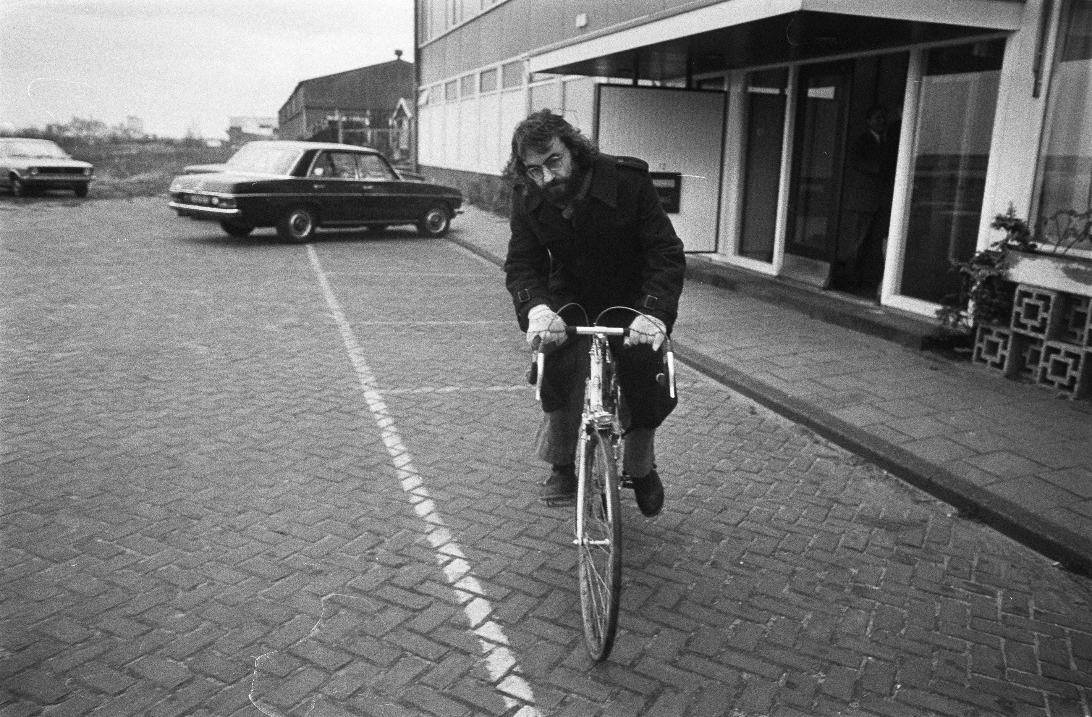 Collectie / Archief : Fotocollectie Anefo Reportage / Serie : [ onbekend ] Beschrijving : Wethouder Roel van Duijn slaat eerste paal voor installa voor het verwerken van autowrakken bij Hollandias Autowrakken BV in Amsterdam; Van Duijn / Datum : 18 december 1974 Locatie : Amsterdam, Noord-Holland Trefwoorden : AUTOWRAKKEN, installaties, wethouders Persoonsnaam : Duijn, Roel van Fotograaf : Peters, Hans / Anefo Auteursrechthebbende : Nationaal Archief Materiaalsoort : Negatief (zwart/wit) Nummer archiefinventaris : bekijk toegang 2.24.01.05 Bestanddeelnummer : 927-6508